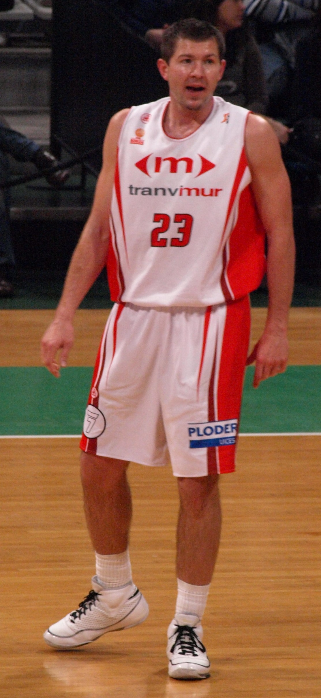 Donatas Slanina con la camiseta del CB Murcia en el partido que enfrentó a su equipo ante el DKV Joventut en el Olímpico de Badalona correspondiente a la temporada regular de la liga ACB 2008/09